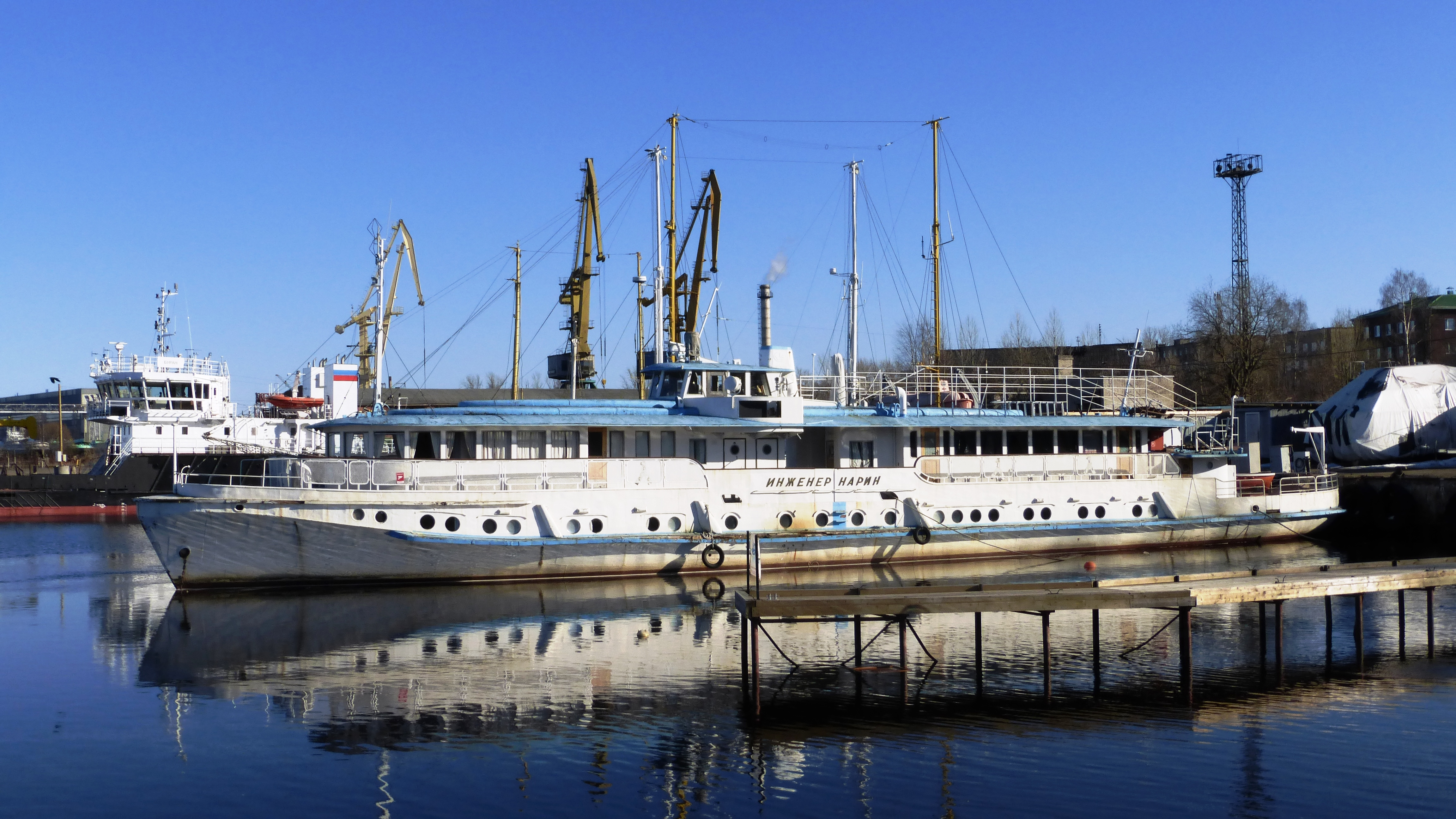 Теплоход «Инженер Нарин» в порту Петрозаводска (до 1981 г. — «Днепро-Буг», 1955 года постройки, проекта 623). Судно названо в честь Нарина Варлена Николаевича (1927—1979) — главного инженера Беломорско-Онежского пароходства (1960—1979), заслуженного инженера Карельской АССР.